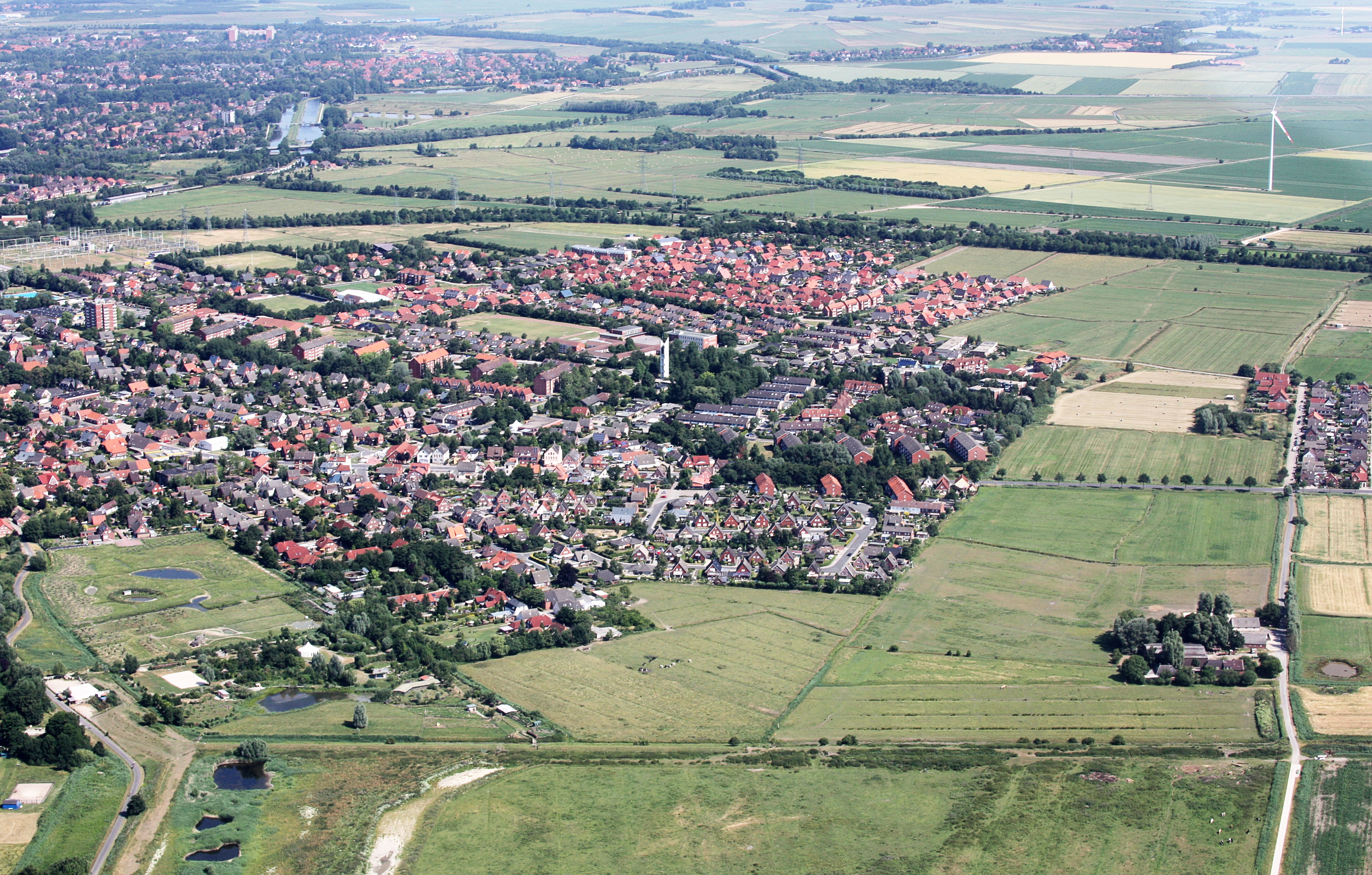 Flug über Emden; Flughöhe 1500 ft; Juli 2010; Originalfoto bearbeitet: Tonwertkorrektur und Bild geschärft mit Hochpassfilter